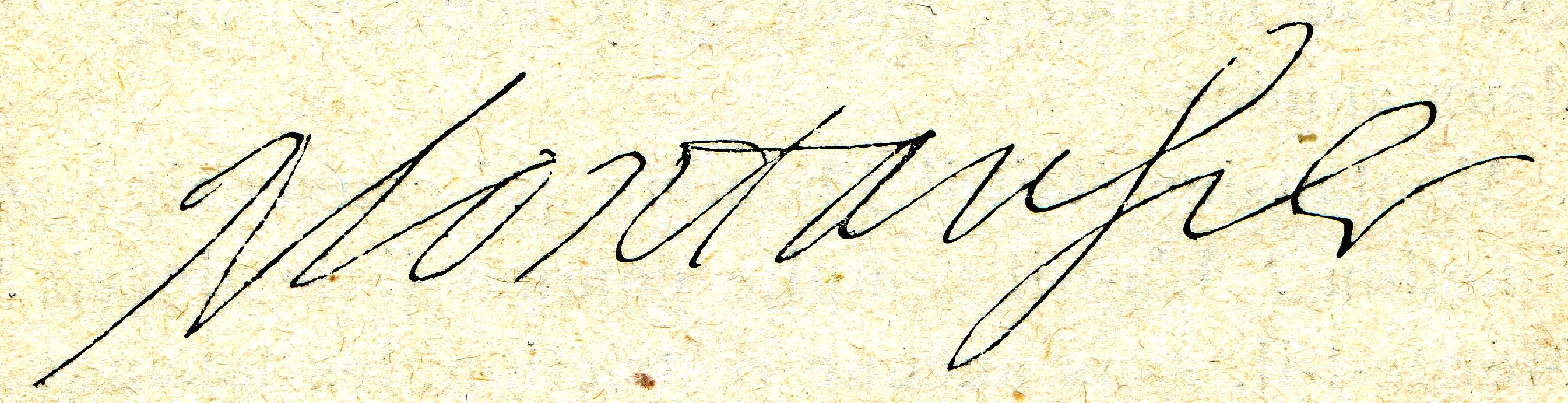 Cabanès, Éducation de Princes011 Signature autographe de Montausier